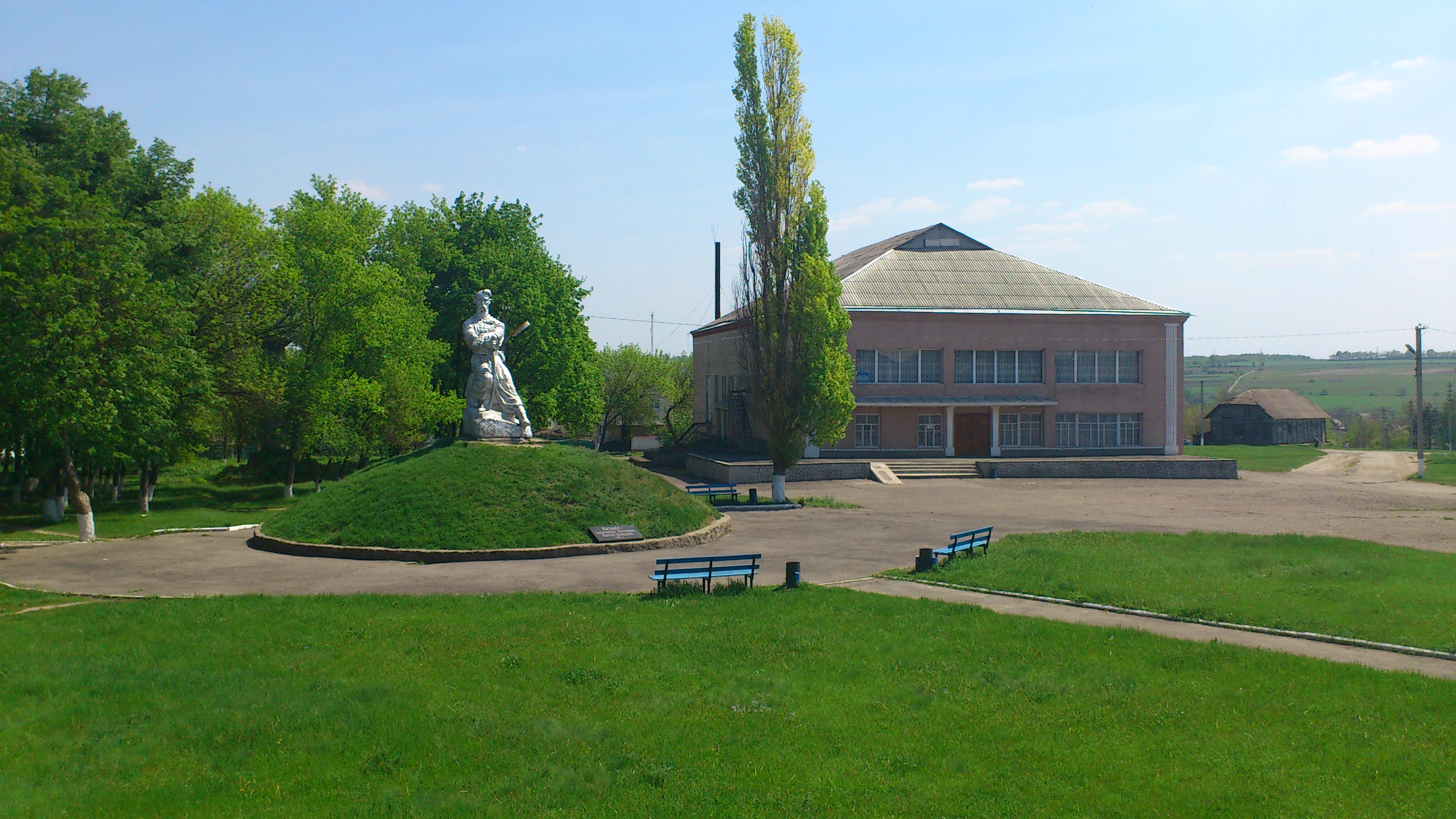 Будинок культури в Торговиці